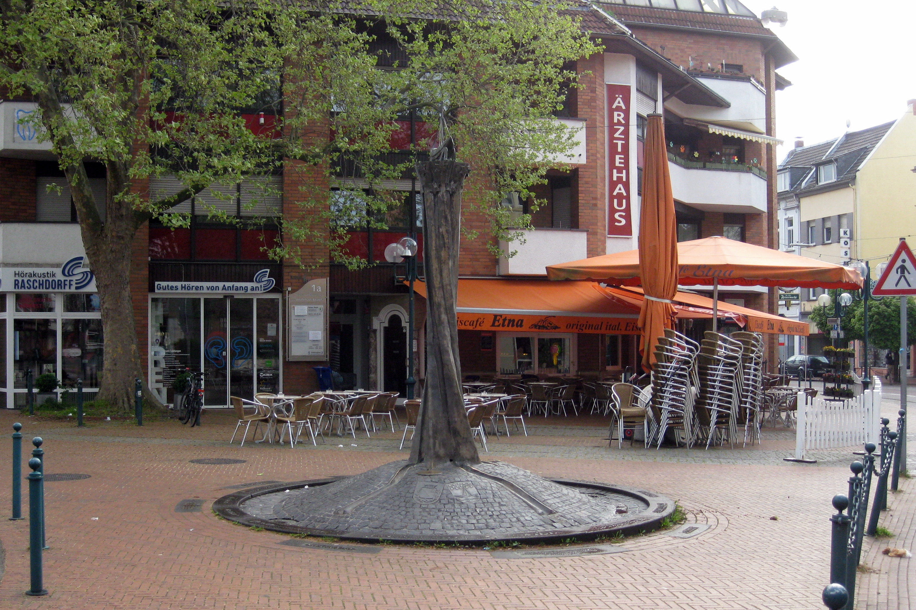 Deutschland, Bonn, Beuel-Mitte, Dr.-Weis-Platz: Stadtbrunnen. Gewidmet vom Heimat- und Geschichtsverein Beuel, gefördert von der Sparkasse Bonn. Zur Erinnerung an die Stadtwerdung Beuels. Künstlerin: Sigrid Wenzel; errichtet im September 1993.